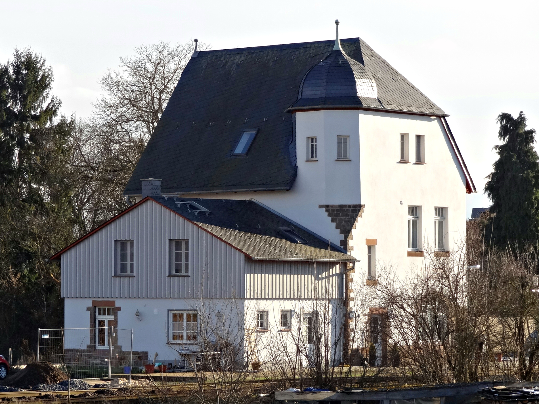 Ehemaliger Bahnhof Griedel